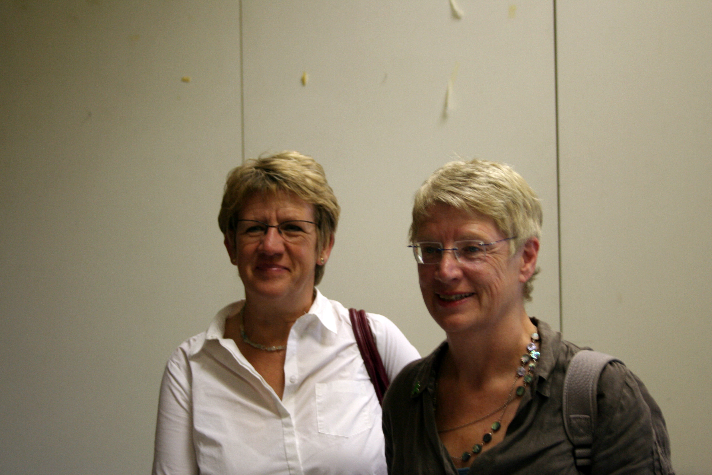 Die Grünen Felicitas Kubala und Elfi Jantzen setzen sich für eine rasche Lösung für die Poelchau-Schule ein.